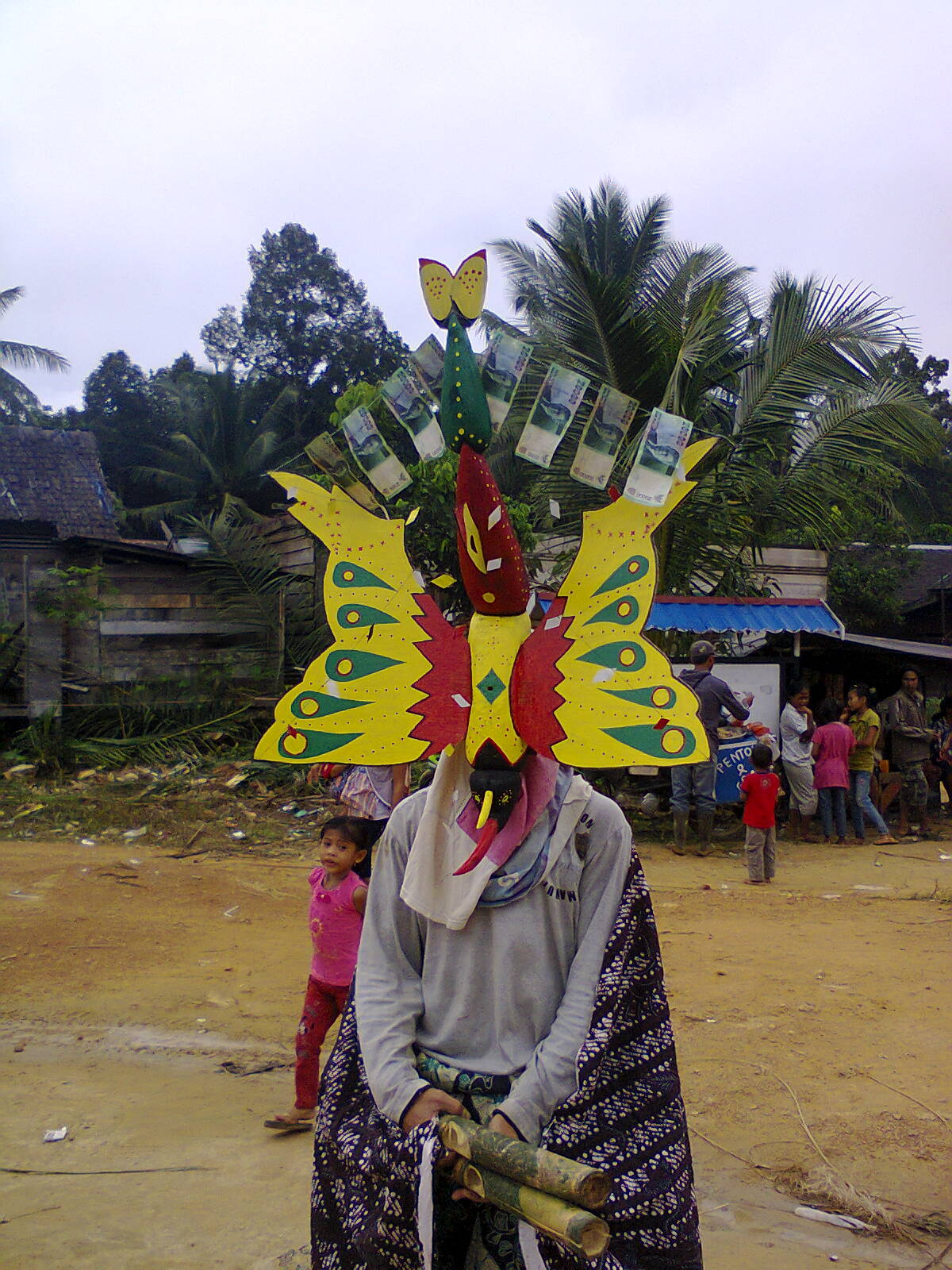 Bukung di desa Luwuk Sampun